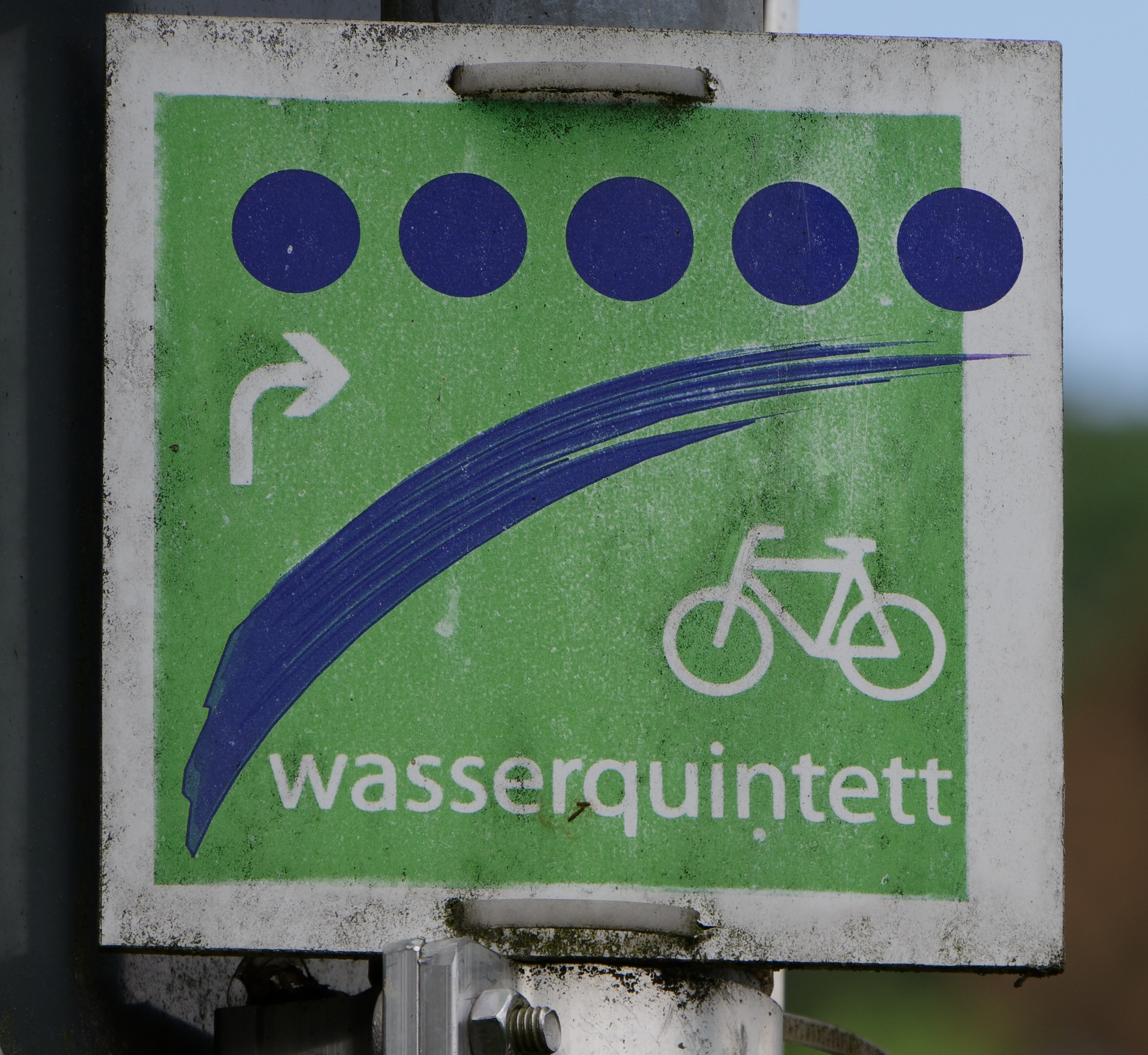 Wasserquintett Radweg